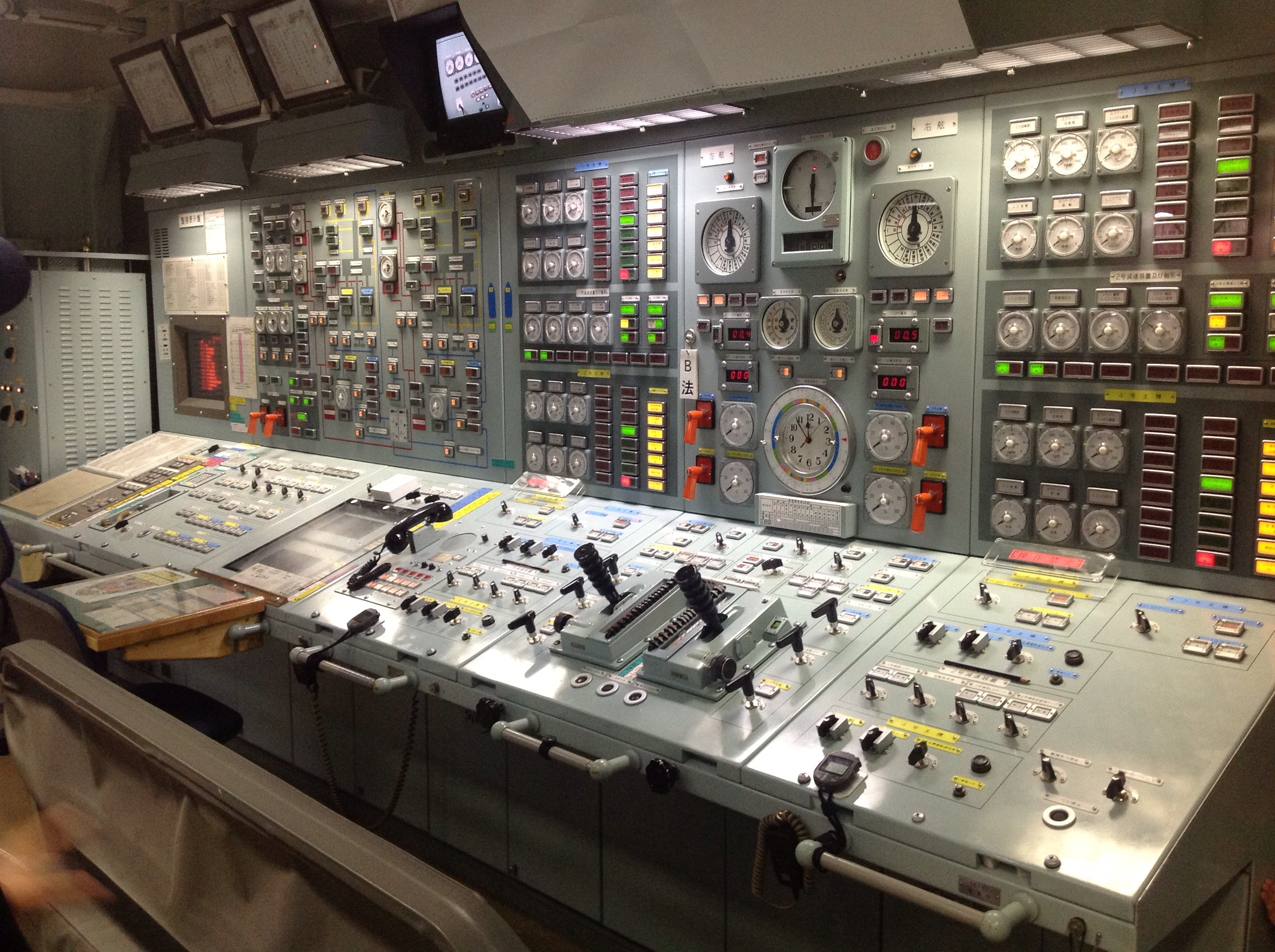 護衛艦ちょうかいの主機操縦室。木更津港における一般公開中に撮影。